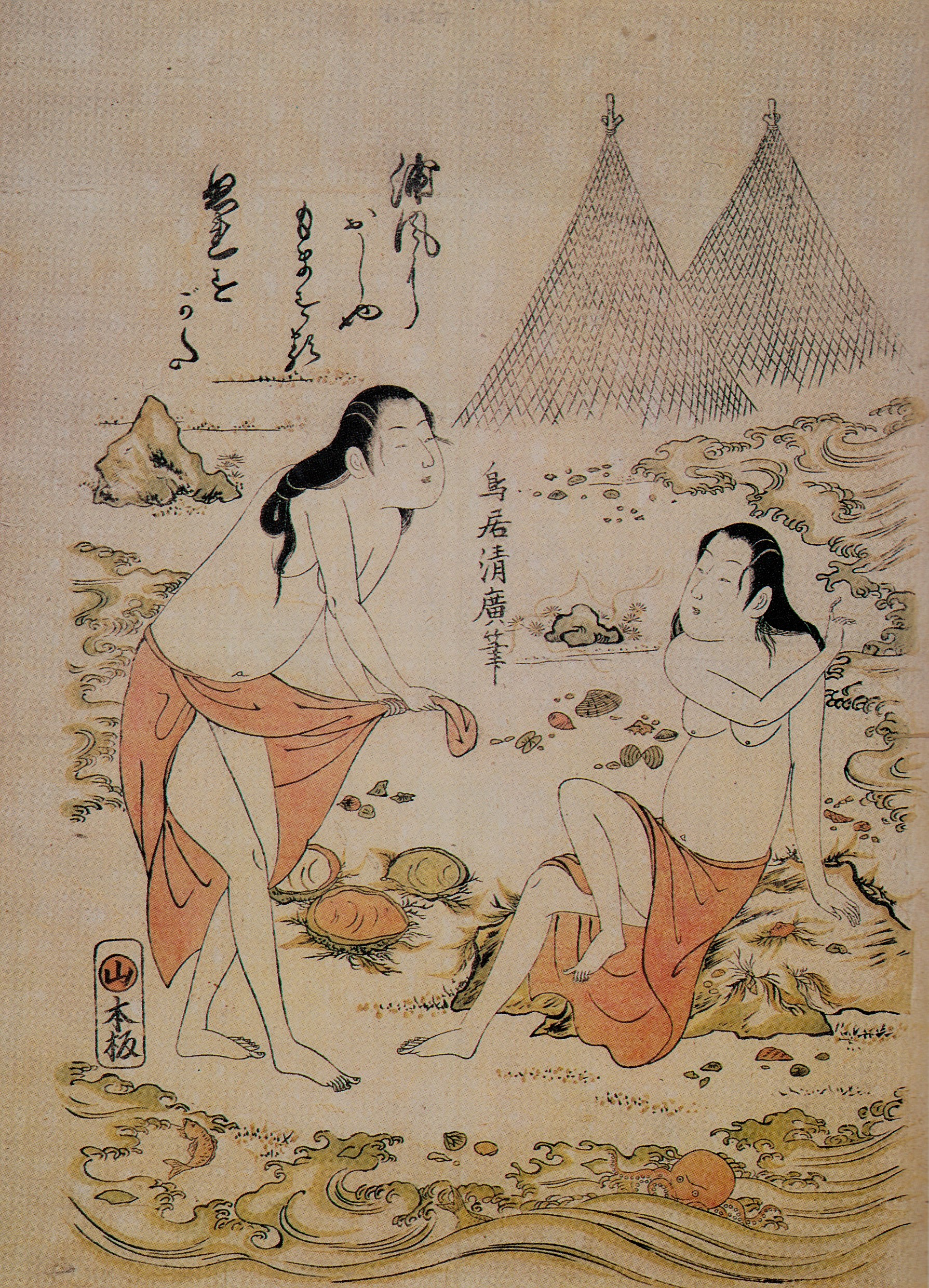 Frauen Muscheln fangend